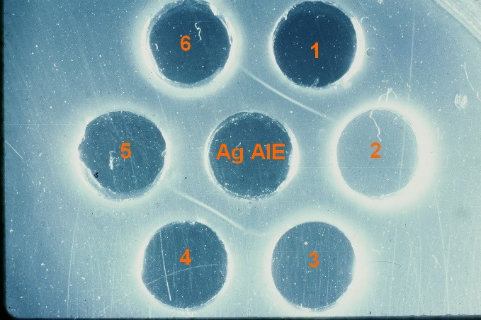 Test de Coggins (immunodiffusion en milieu gélifié) : une ligne de précipité apparait dans la zone de rencontre de l'antigène AIE présent dans la cupule centrale et des anticorps correspondants présents dans des sérums ; 1 et 4 : sérum positif connu ; 2, 5 et 6 sérums testés à réponse négative ; 3 : sérum testé à réponse faiblement positive (déviation de la ligne de précipité du sérum voisin positif connu)